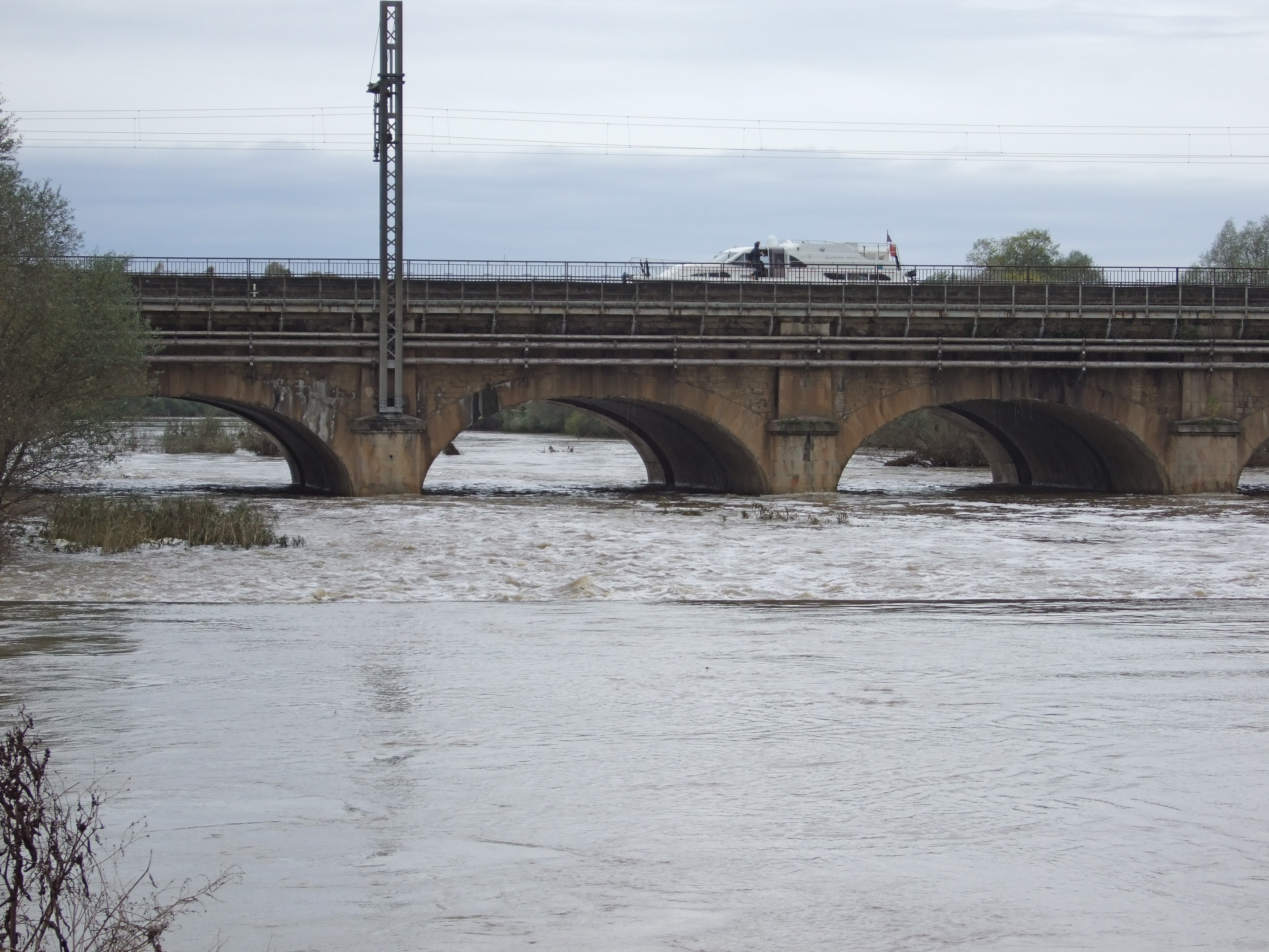 Kombinierte Kanal- und Eisenbahnbrücke über die Meurthe bei Saint-Phlin